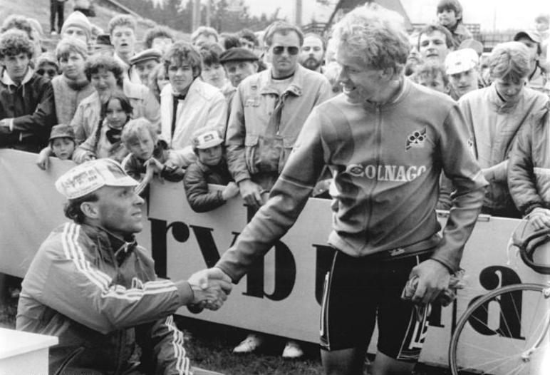 Uwe Ampler, Zenon Jaskula ADN-ZB CTK-Tele-17-5-87 CSSR: 40 Internationale Friedensfahrt - 9. Etappe - Einzel-Bergzeitfahren-Herzlich gratuliert der polnische Fahrer Zenon Jaskula dem Etappensieger des Einzel-Bergzeitfahrens über 22 km in Harrachov, Uwe Ampler. Zenon Jaskula errang mit 33:27,7 den zweiten Platz.